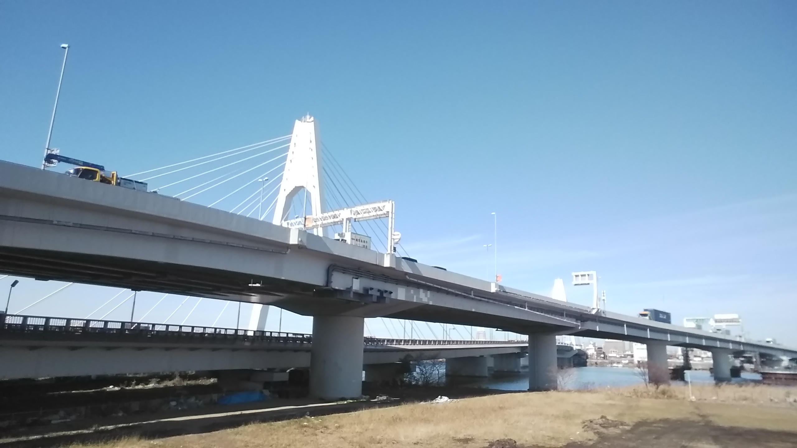 首都高速横羽線の高速大師橋。右岸（川崎市側）下流より